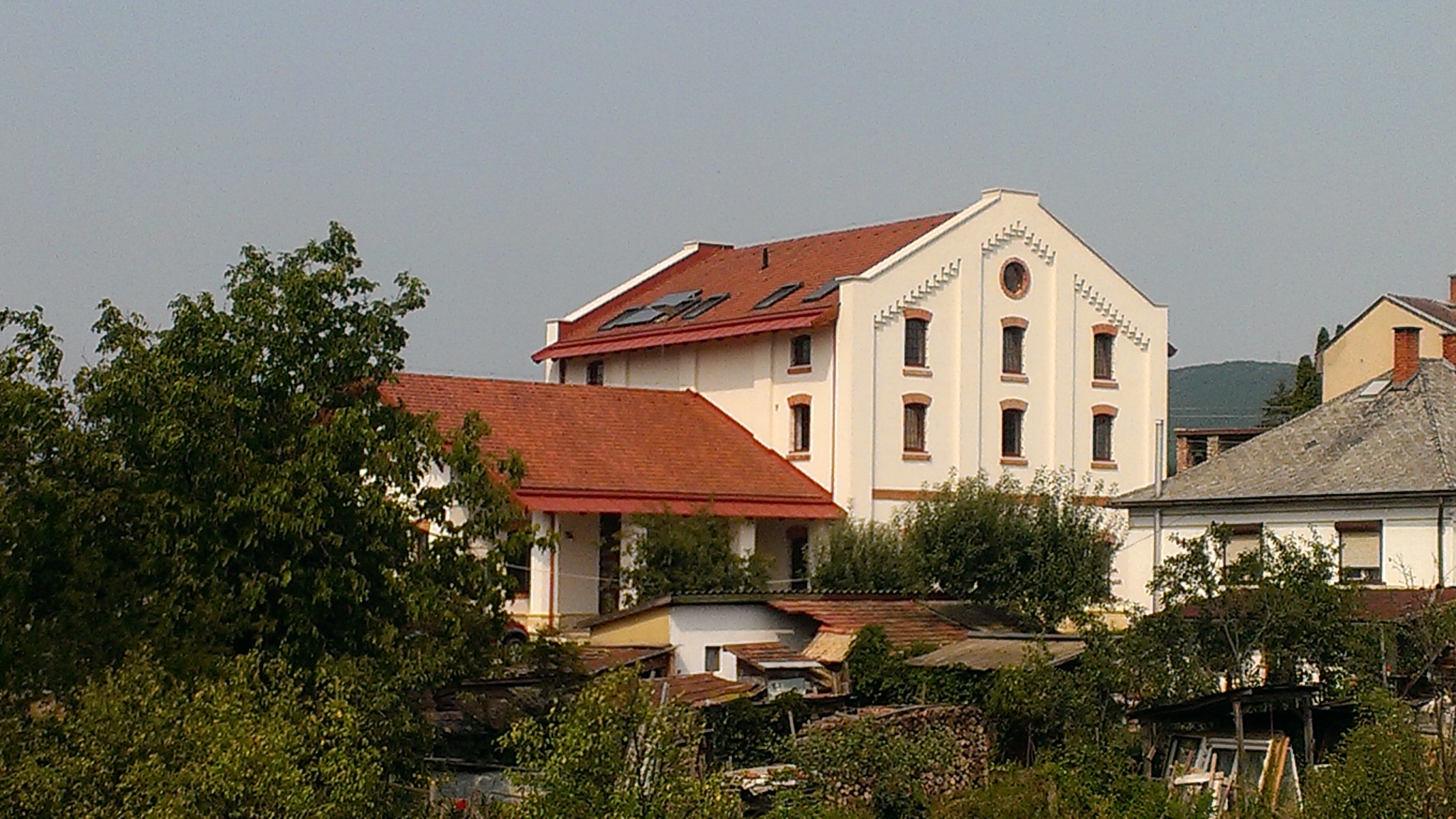 Old mill